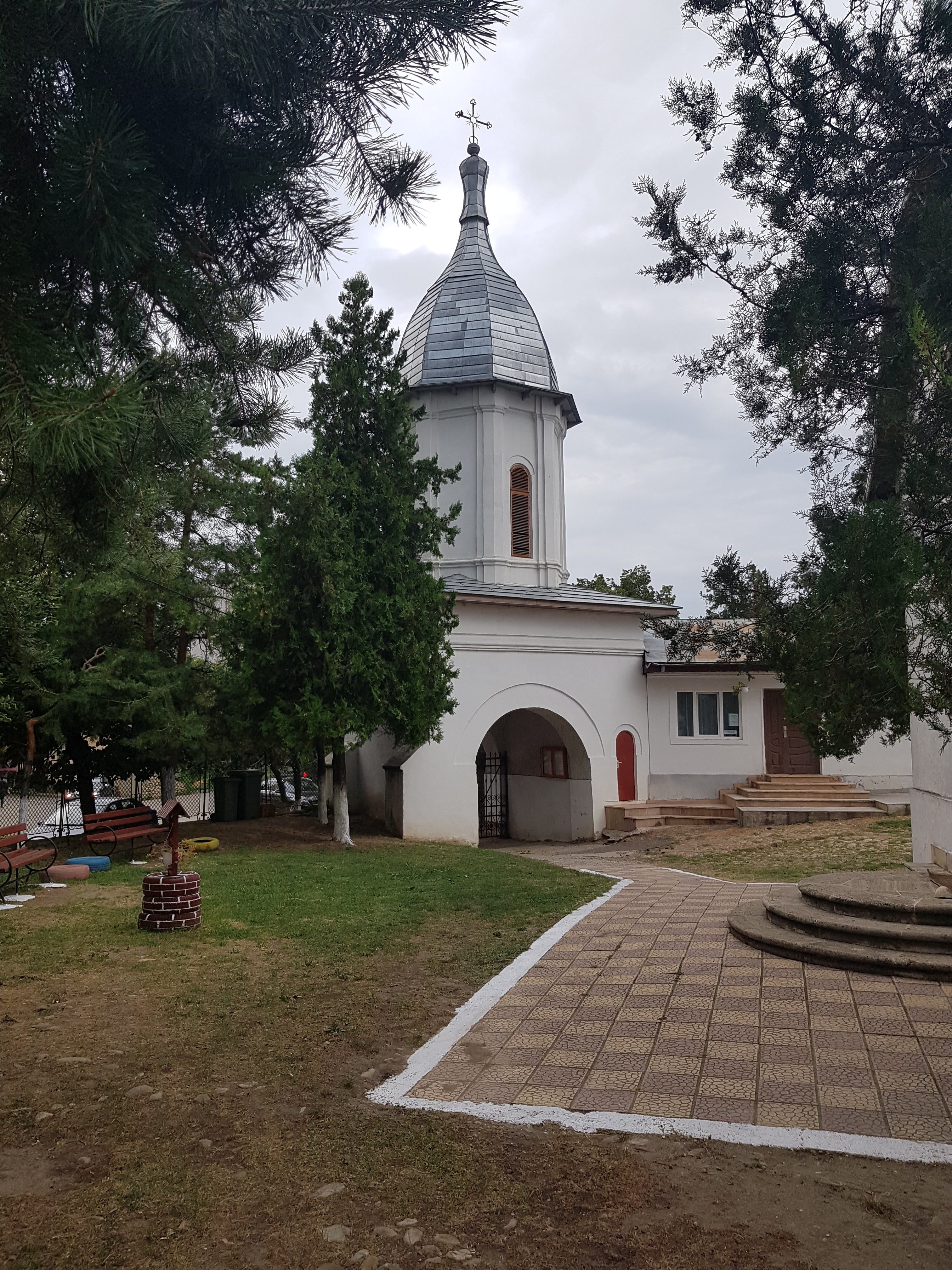 Turn clopotniță 02